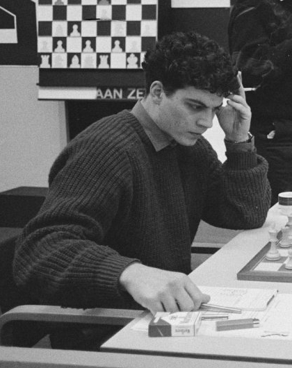 Hoogovenschaaktoernooi 1985; Eric Lobron.